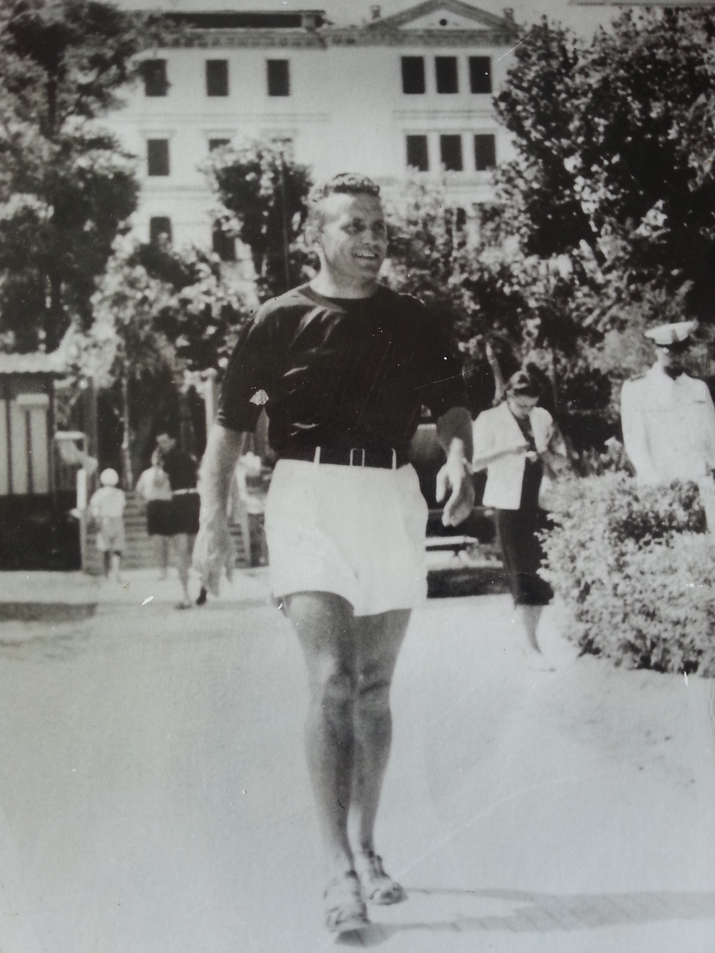 Il calciatore italiano Pietro Serantoni in passeggiata a Venezia.